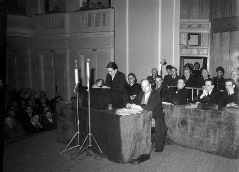 Dessau, Herwegen-Prozeß ADN-ZB/ Illus- Heilig Beginn des Dessauer Millionenschieber-Prozesses. Am 24. April 1950 begann vor dem ersten Strafsenat des Obersten Gerichts der Deutschen Demokratischen Republik der Prozess gegen den ehemaligen Minister für Arbeit und Sozialwesen von Sachsen-Anhalt, Herwegen, und seine Mitangeklagten. Die Verhandlungen, die unter starker Teilnahme der werktätigen Bevölkerung im Landestheater Dessau stattfinden werden von der Vizepräsidentin des Obersten Gerichtshofes, Hilde Benjamin, geführt. Dr. Leo Herwegen, ehem. Minister für Arbeit und Sozialwesen in Sachsen Anhalt; Prof. Dr. Willi Brundert, ehem. stellvertretender Wirtschaftsminister von Sachsen-Anhalt; Dipl.-Ing. Hermann Müller, ehem. Direktor der Deutschen Continentalen Gasgesellschaft in Dessau; Dr. Leopold Kaatz, ehem. Direktor der Dessauer Zuckerraffinerie und Präsident der Industrie und Handelskammer in Dessau; Ernst Simon, ehem. Landgerichtsdirektor in Dessau und später juristischer Hilfsarbeiter der Deutschen Continentalen Gasgesellschaft; Paul Heil, ehem. Rechtsanwalt und Notar; Ernst Pauli, ehem. Wirtschaftsbeautragter beim Oberbürgermeister der Stadt Dessau und gleichzeitig Leiter der Abteilung Industrie bei der Industrie und Handelskammer in Dessau; Heinrich Scharf, ehem. Mitglied des Direktoriums der Landeskreditbank Sachsen-Anhalt, werden angeklagt, die Überführung des Konzerns der Deutschen Continentalen Gasgesellschaft in das Eigentum des Deutschen Volkes planmäßig sabotiert zu haben. Gegen den ehem. Direktor der Deutsche Continentalen Gasgesellschaft Friedrich Methfessel, der sich durch die Flucht nach Westdeutschland vorläufig der Verantwortung entzogen hat, wird in Abwesenheit verhandelt. Schlußphase und Urteilsverkündung im Herwegen-Prozeß UBz: Frau Dr. Gentz bei ihrem Plädoyer. Hinter den Verteidigern die Angeklgten von links nach rechts: Herwegen, Brundert, Müller, Kaatz und Simon 01.05.50 6318-50 [Urteilsverkündung war am 29.4.1950.]